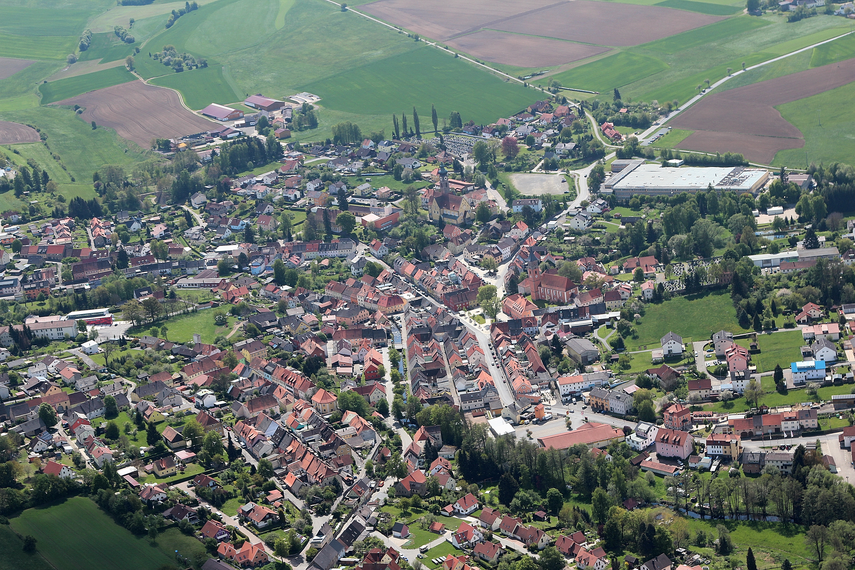 Blick auf Floß, Landkreis Neustadt an der Waldnaab, Oberpfalz, Bayern (2014)